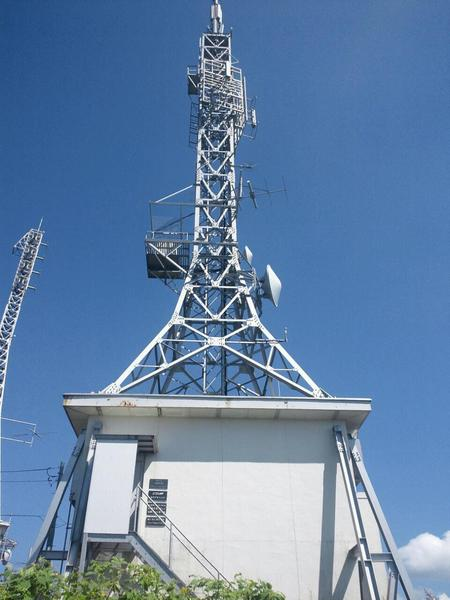 折爪岳デジタルテレビ中継所